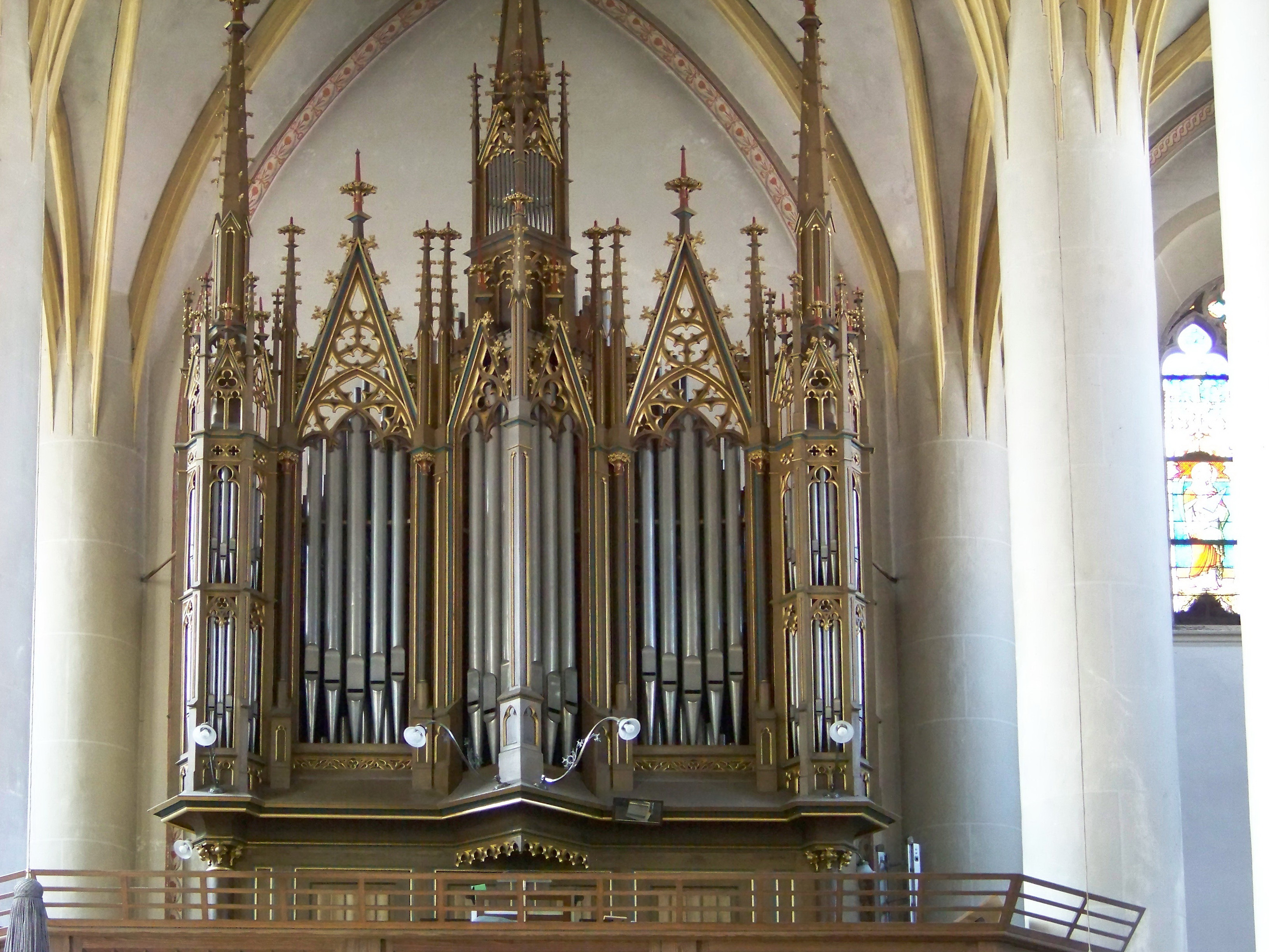 Dingolfing, Pfarrplatz 9. Katholische Pfarrkirche St. Johannes. Die Orgel der Kirche wurde im Jahr 1884 als Opus 255 von G. F. Steinmeyer & Co. geschaffen und 1986 von Georg Jann aus Allkofen umgebaut.